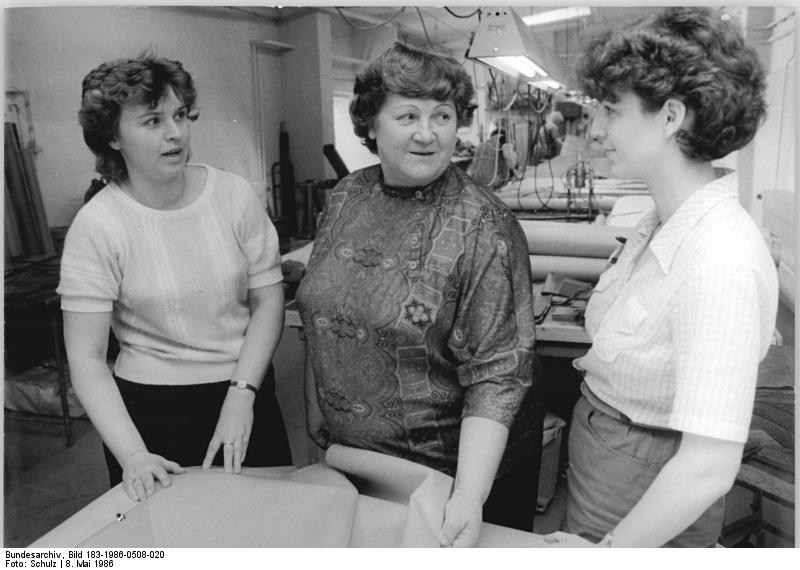 ADN-ZB/Schulz-8.5.1986-Magdeburg: Abgeordnete Seit fast 20 Jahren leitet Gisela Fuchs, (M.) den VEB Fortschritt Magdeburg. Von ihren Kollegen wurde sie jetzt zum achten Mal als Kandidatin für die Volkskammer vorgeschlagen. Die 58jährige trägt das Mandat des DFD, ist stellvertretende Fraktionsvorsitzende und Vorsitzende des Ausschusses für Arbeit und Sozialpolitik. - Im Gespräch mit Christine Dammann, Leiter Beschaffung-Absatz (l.) und Manuela Ducklaus, Leiter Ökonomie.